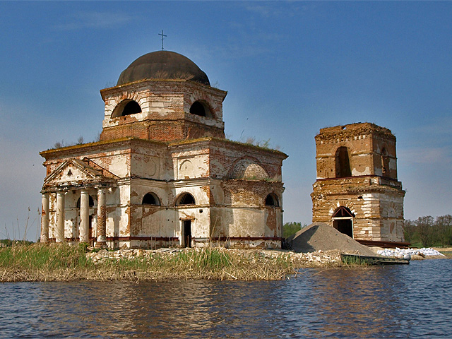 Преображенский храм в Гусинцах